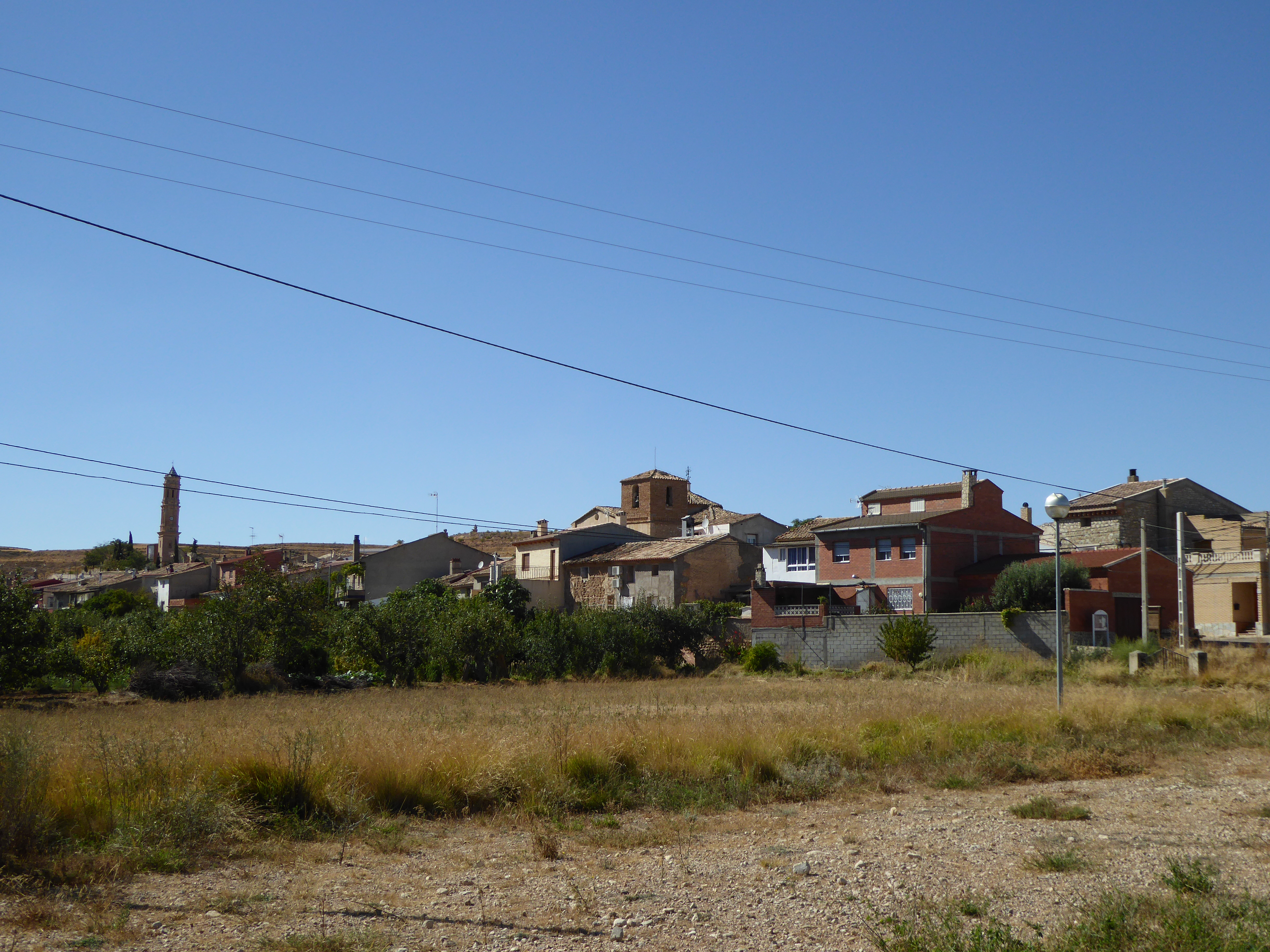 Samper del Salz